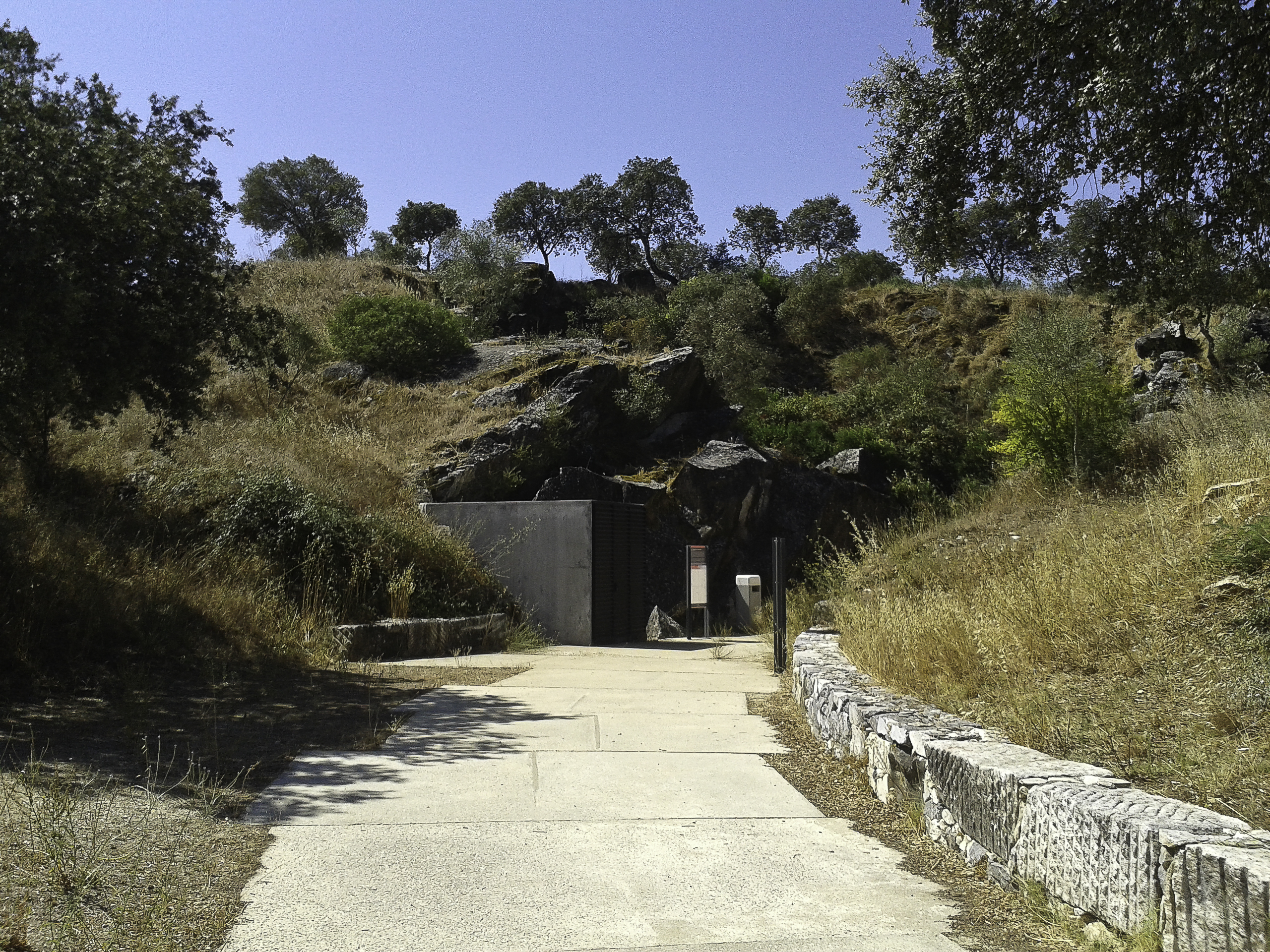 Entrada para o conjunto arqueológico da Gruta do Escoural vista do portão.